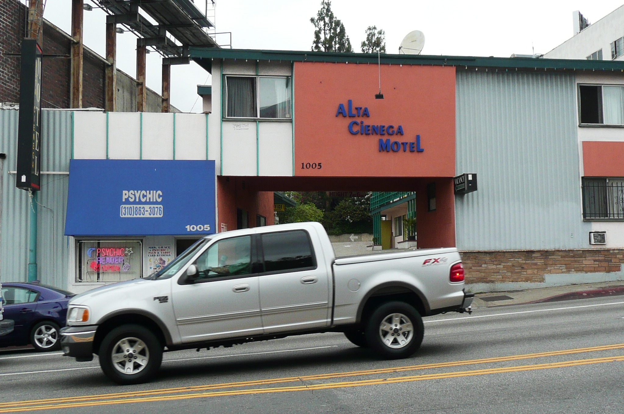 Alta Cienega Motel (Ecke La Cienega/Santa Monica Boulevard), in dem Jim Morrison das Zimmer Nr. 32 direkt über der Einfahrt mehrere Jahre hindurch bewohnt hat, eigene Aufnahme